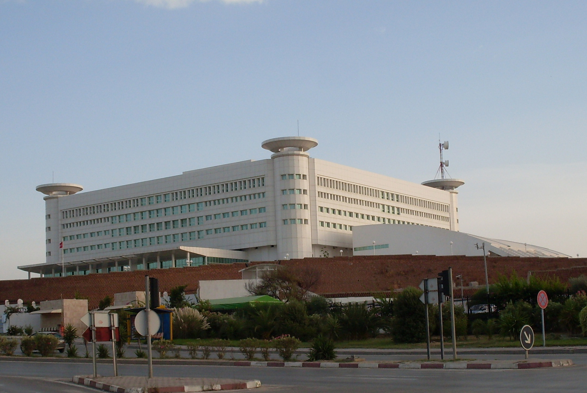 Nouveau siège de la Télévision Tunisienne à Tunis